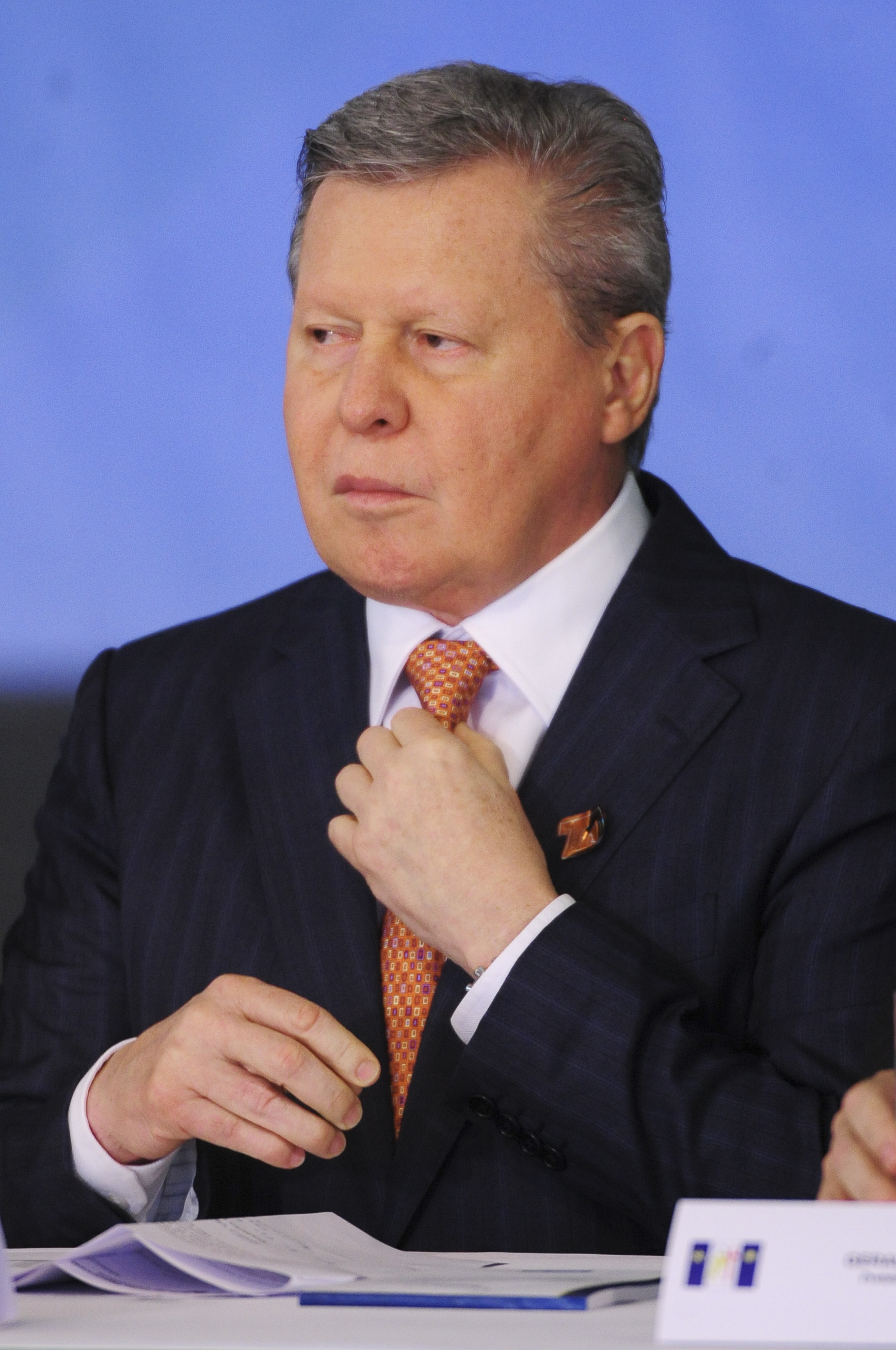 O presidente do Senado Federal, senador Renan Calheiros (PMDB-AL), e o presidente da Câmara dos Deputados, Eduardo Cunha (PMDB-RJ), recebem prefeitos e autoridades do Poder Legislativo no Salão Negro do Congresso Nacional para debater o pacto federativo e desenvolvimento regional. Em destaque, prefeito de Manaus, Arthur Virgílio Neto. Foto: Pedro França/Agência Senado